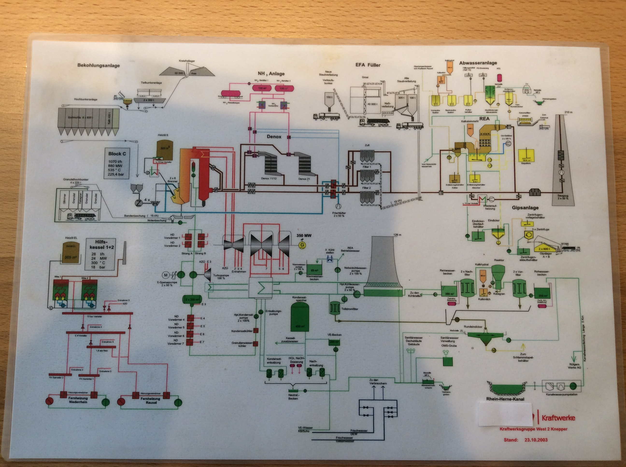 Block C Kraftwerk Knepper